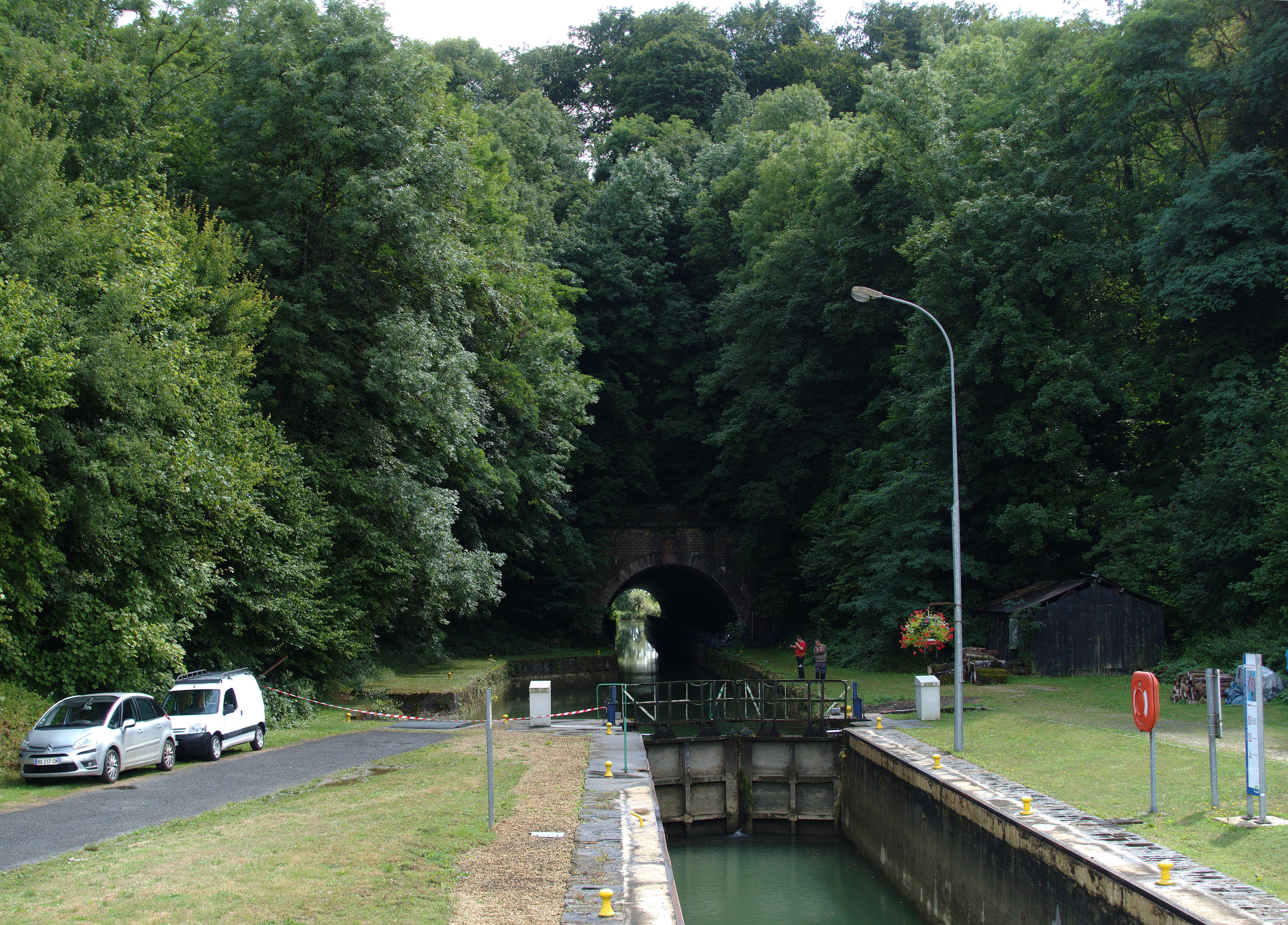 Kanaal door tunnel bij Saint-Aignan (Fr) Canal des Ardennes